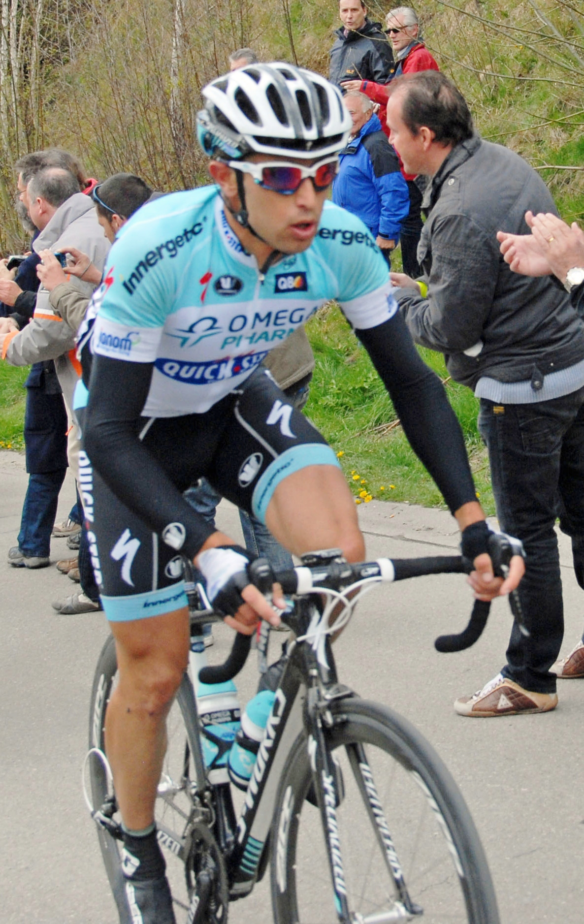 Côte de Stockeu in Luik-Bastenaken-Luik 2012